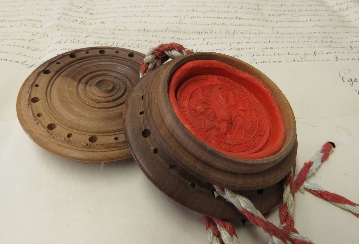 Sceau provenant du fonds Imer